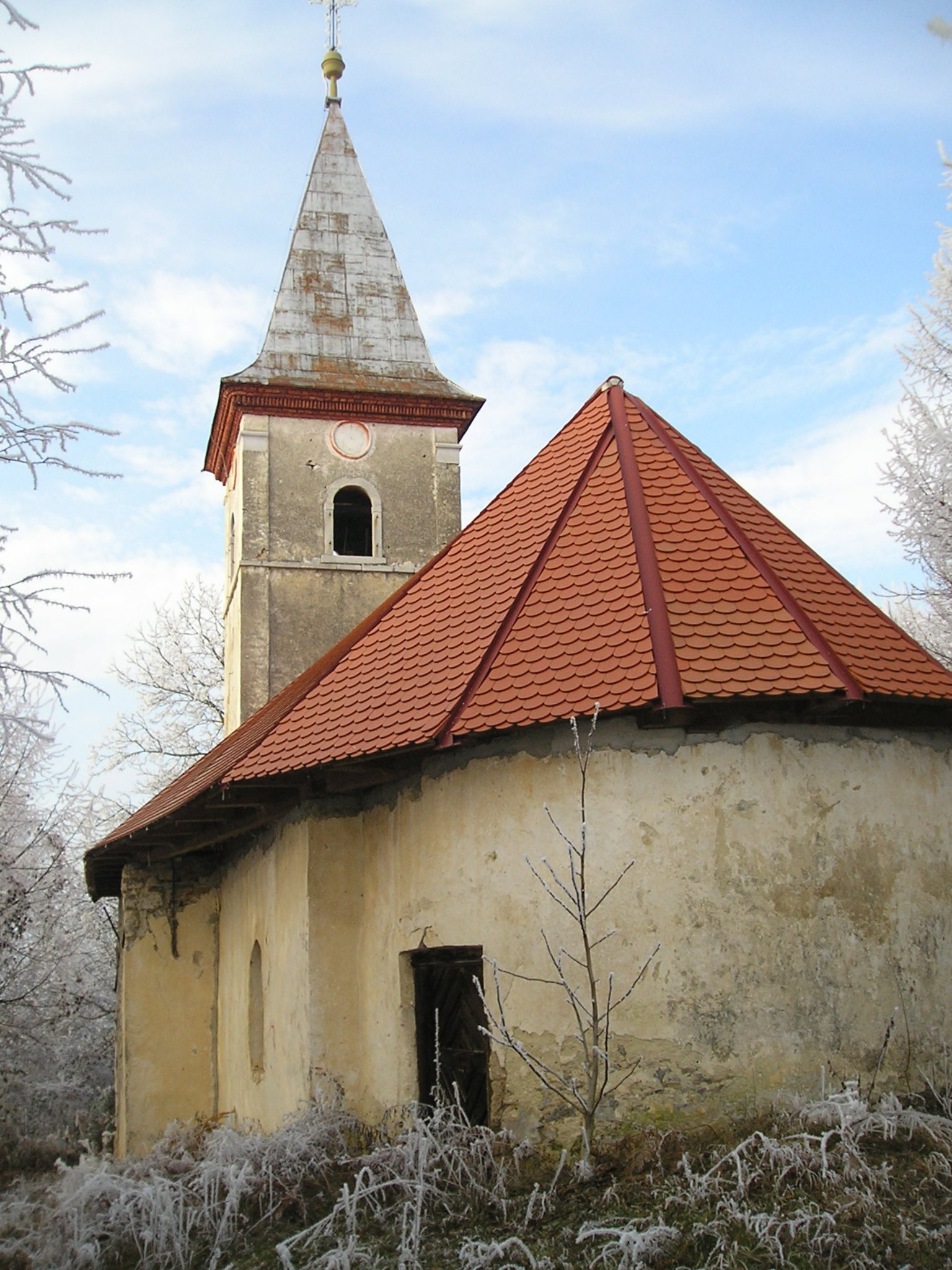 Rosopajnik, kapela sv. Antuna Pustinjaka